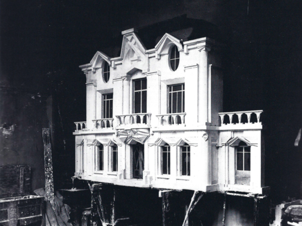 Raymond Duchamp-Villon, 1912, Maquette originale de La Maison Cubiste (Cubist House, Façade architecturale), Document du Musée National d'Art Moderne, Paris